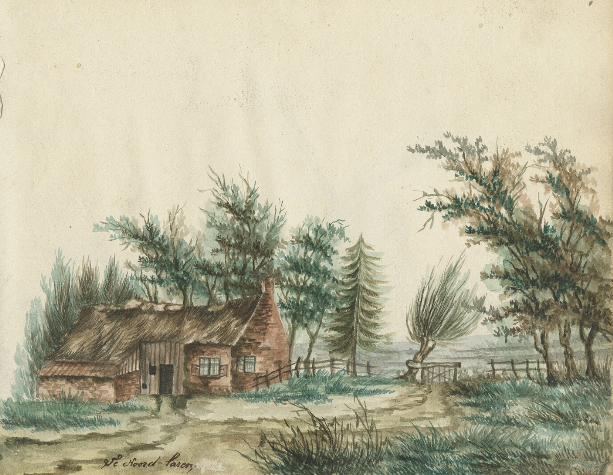 Boerderijtje te Noordlaren